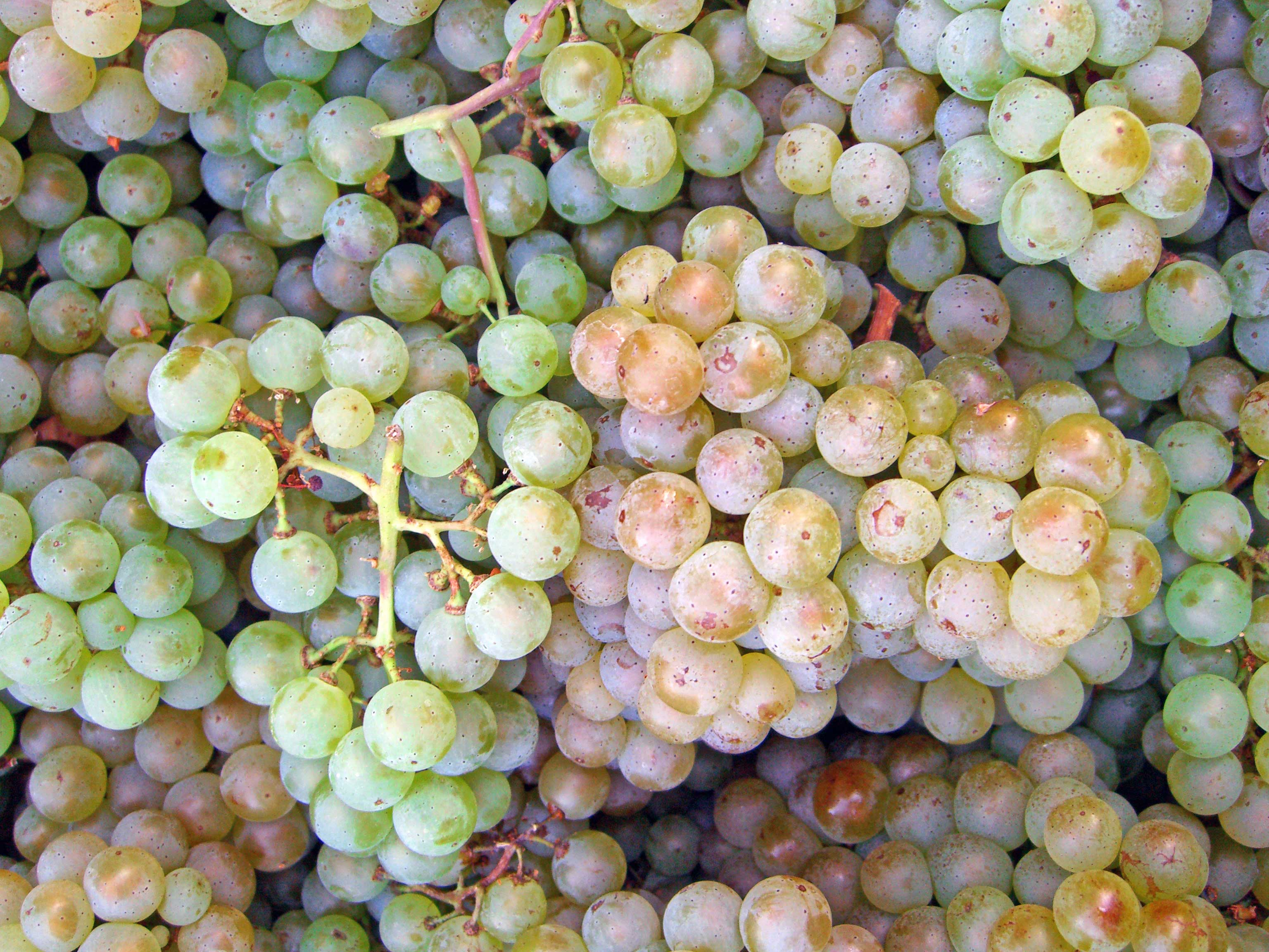 Pinot Blanc grapes